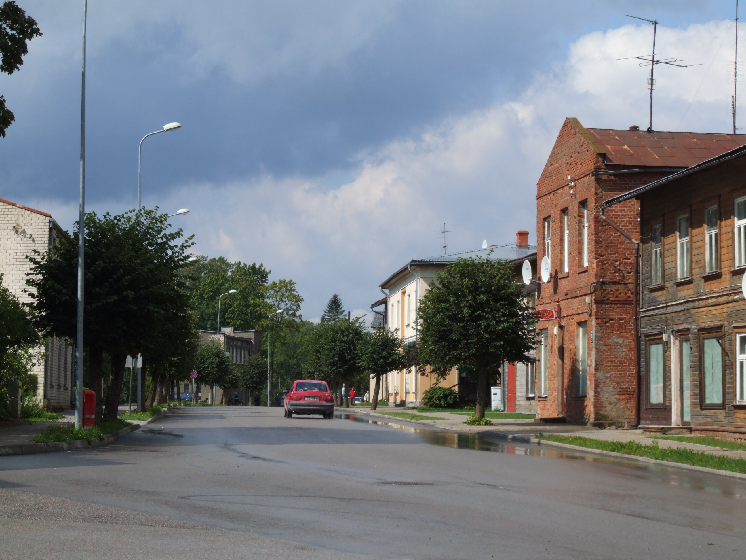 Baznīcas iela, Mazsalaca